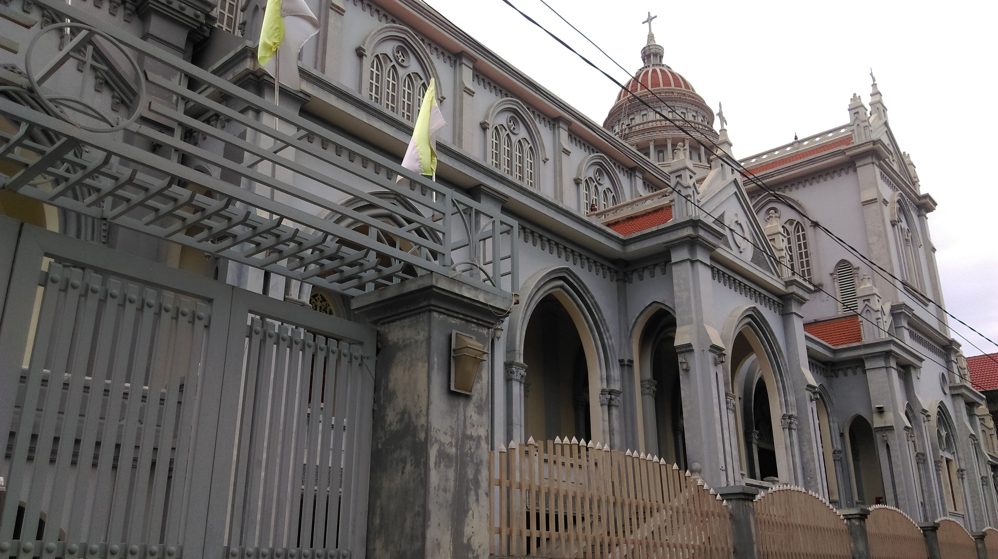 Nhà thờ Giáo xứ Cửa Lò, Nghệ An